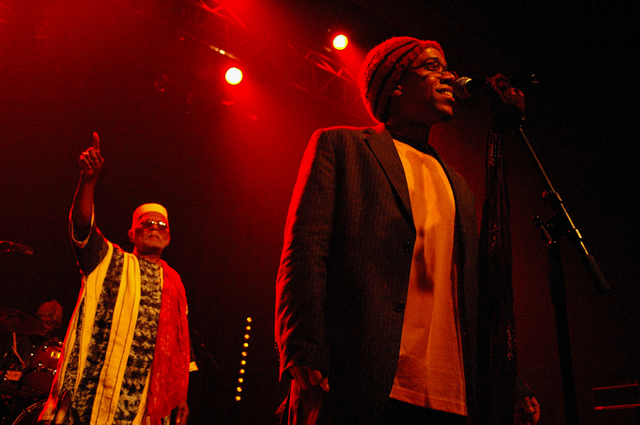 Arrested Development en concert au Het Depot